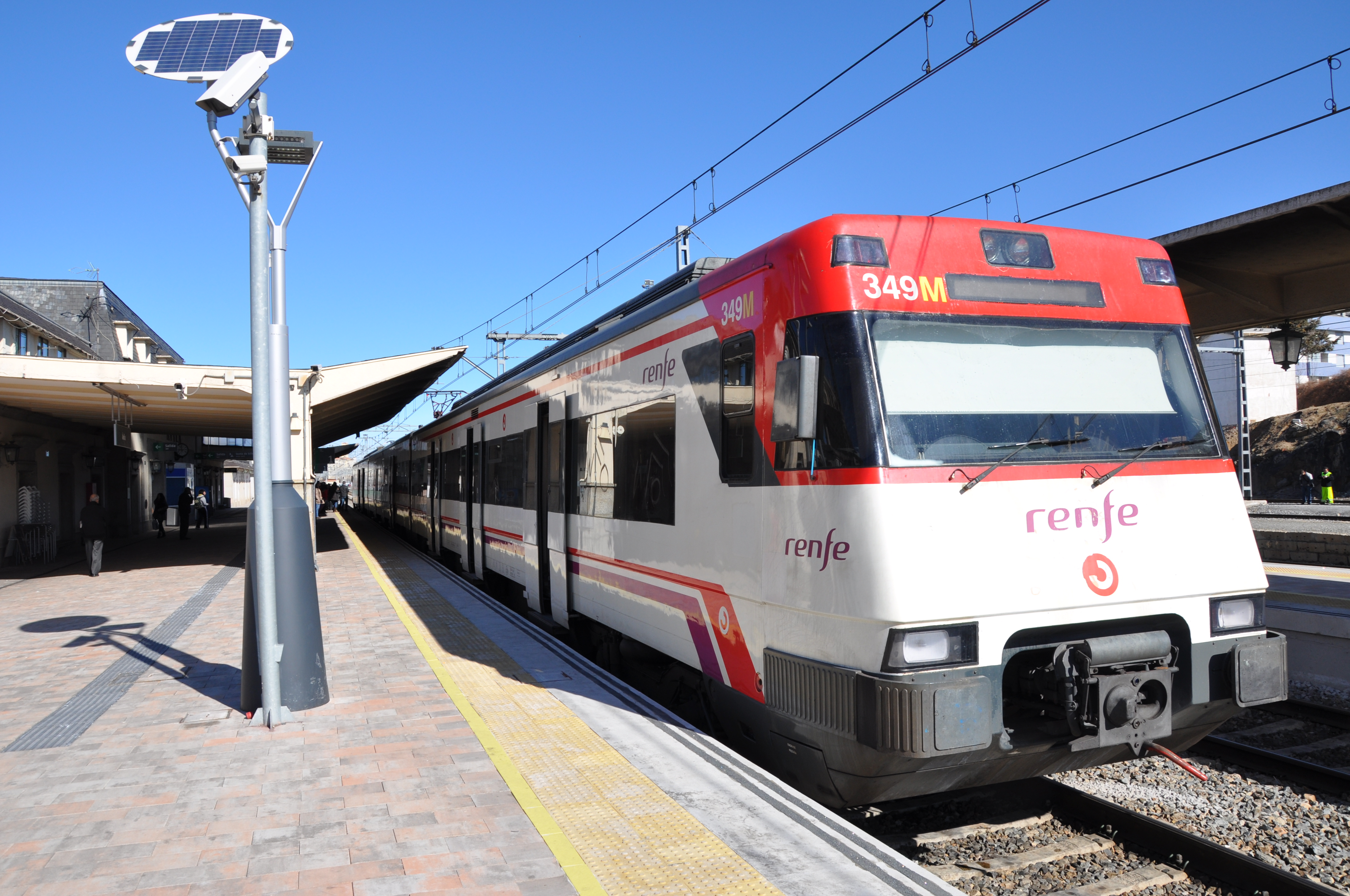 Tren parado en la estación de Ávila, España.